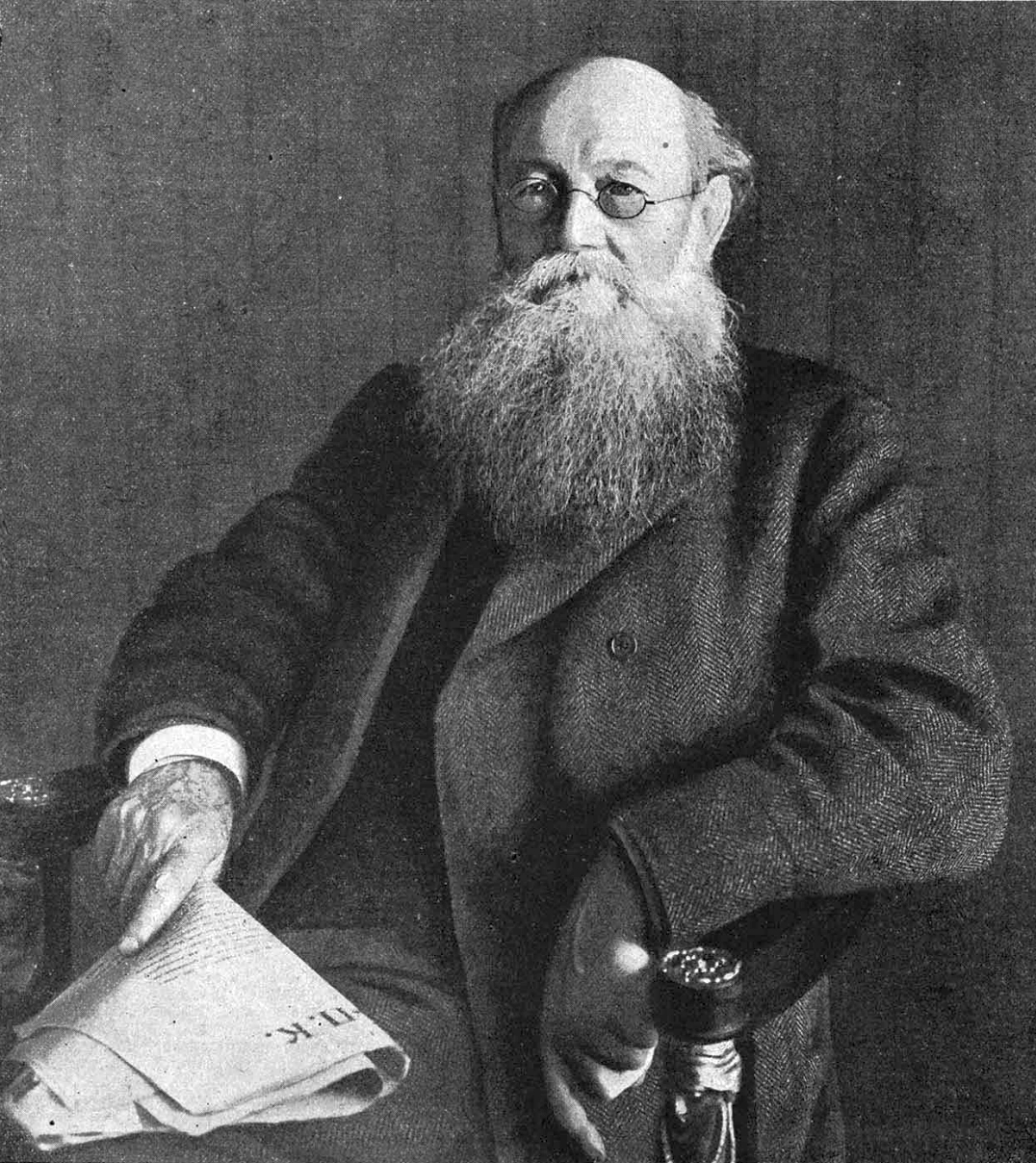 Кропоткин, Пётр Алексеевич